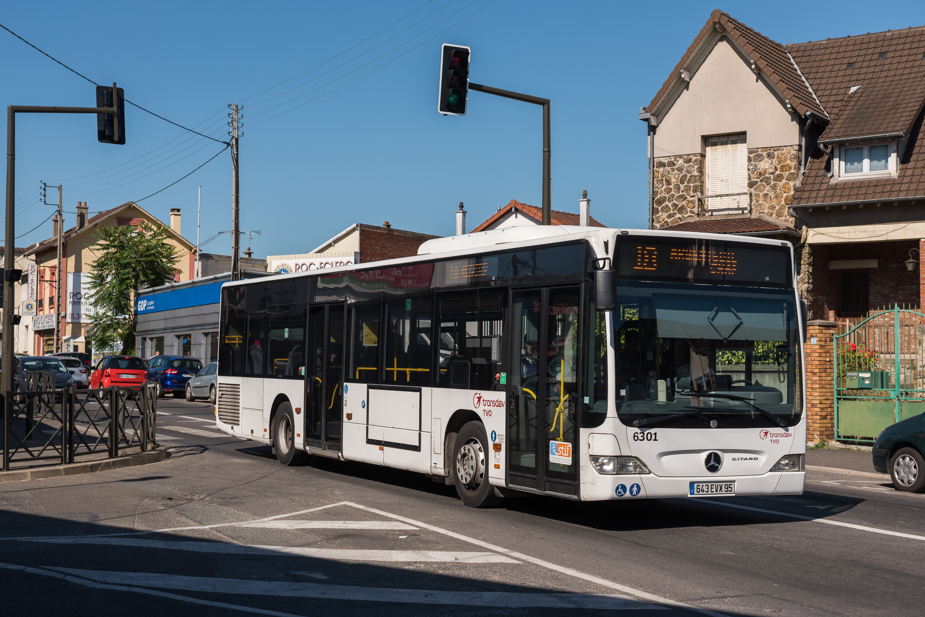 A priori, un Citaro tout blanc bien ennuyeux, mais l'un des 3 de TVO (avec les 6302 et 6303) à avoir la clim intégrale au lieu de "l'arnaque" (ou la clim conducteur) installée sur les suivants... Une photo des deux autres viendra (sans se presser non plus...) Bus transport in Paris and Île-de-France.